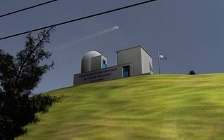 Representación artística de como quedará el observatorio terminado.